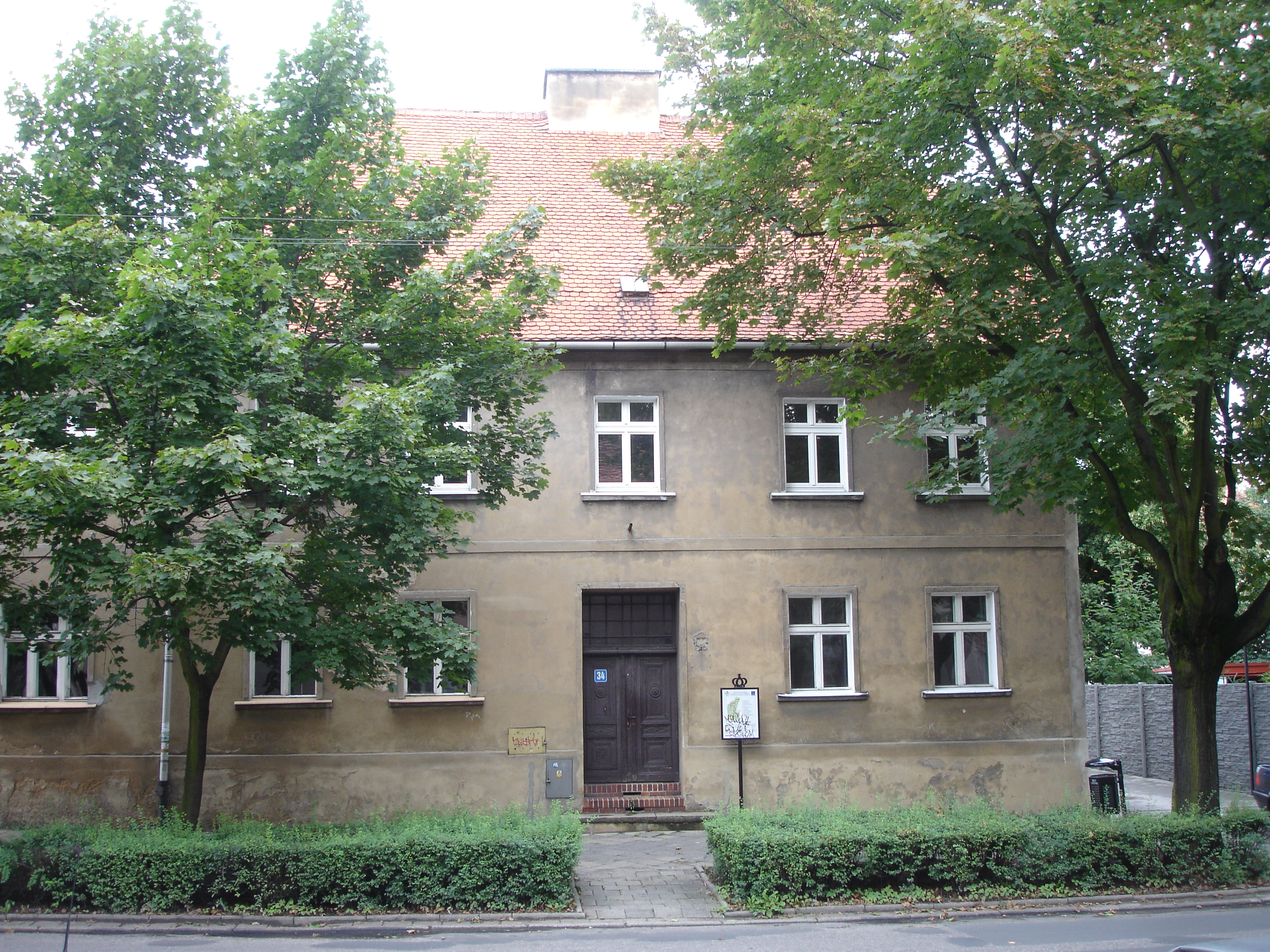 Leszno, ul. Bolesława Chrobrego 34 - kamienica z 2. połowy XVIII w., urodził się tu Leo Baeck (zabytek nr 637/Wlkp/A)